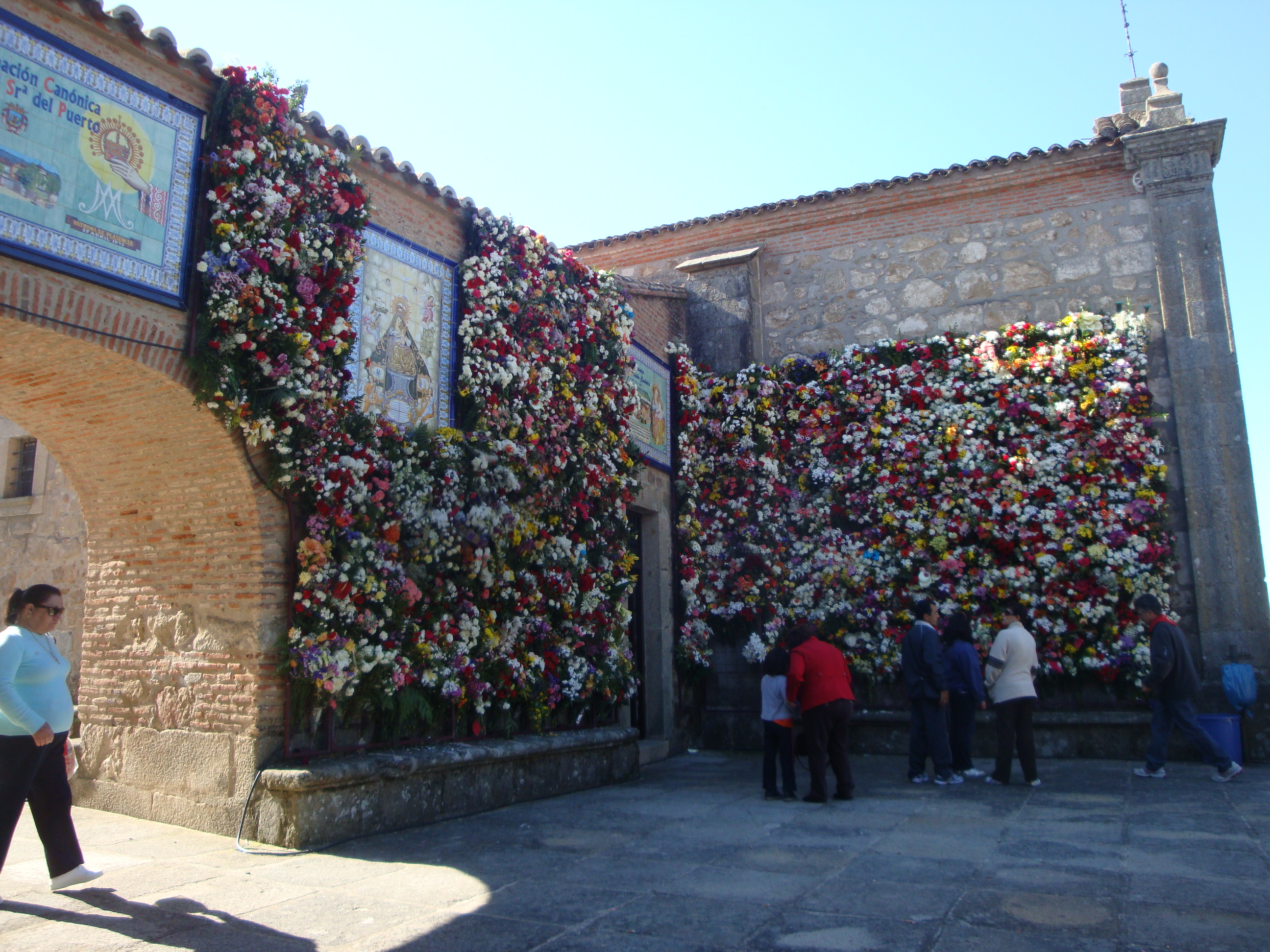 Ofrenda floral Vigen del Puerto. 2010 (Plasencia)